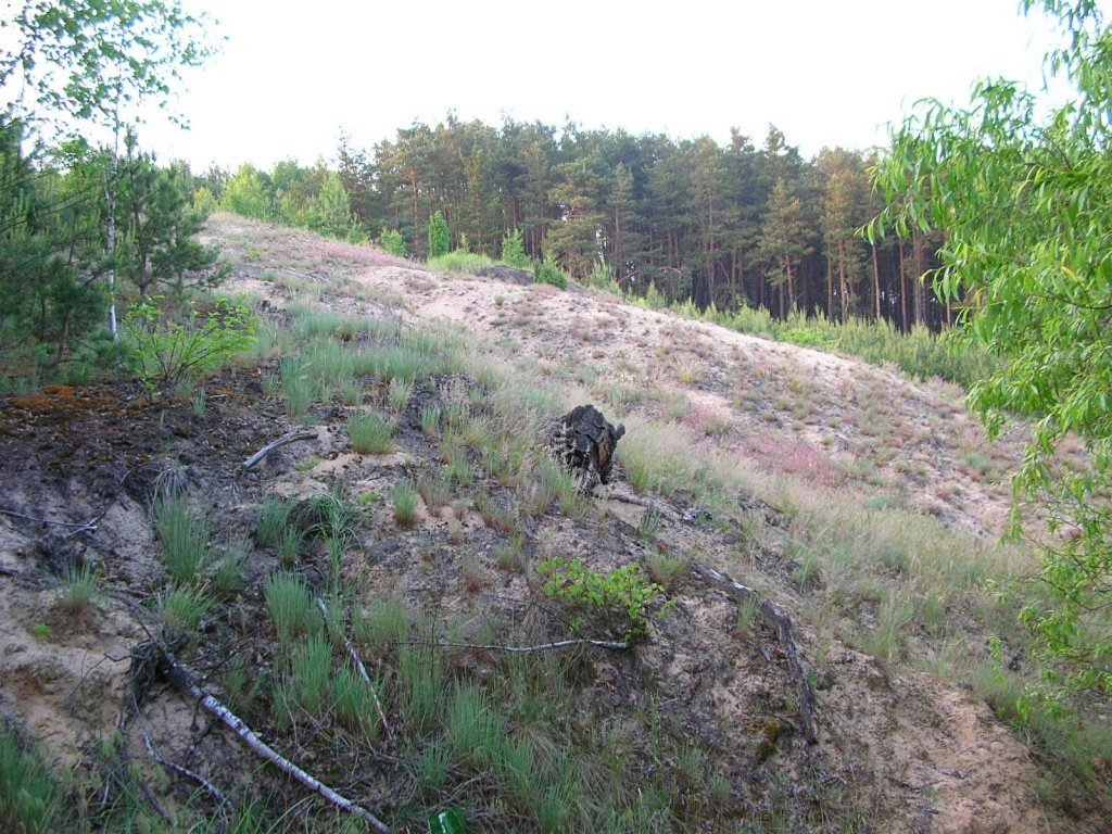 Wydma z Puszczy Bydgoskiej, w pobliżu Łęgnowa